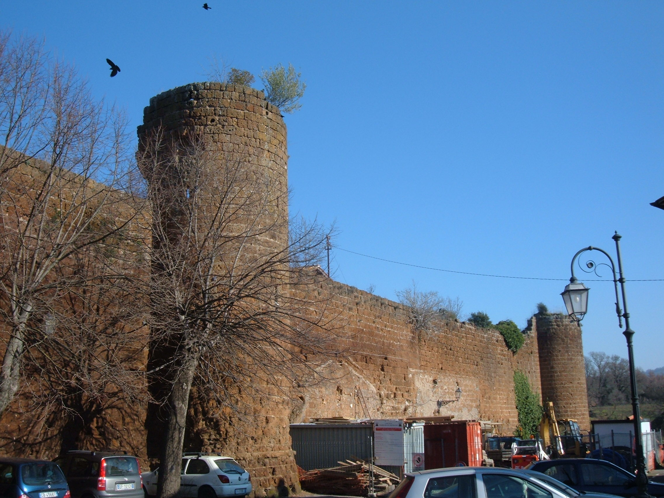 Mura medievali di Barbarano Romano.